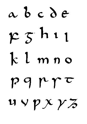 Voorbeeld van insulair cursief schrift